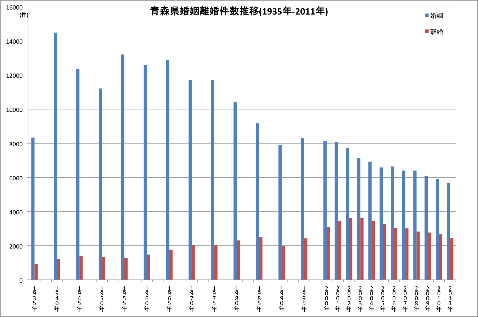 青森県の婚姻と離婚の件数の推移 Unknown